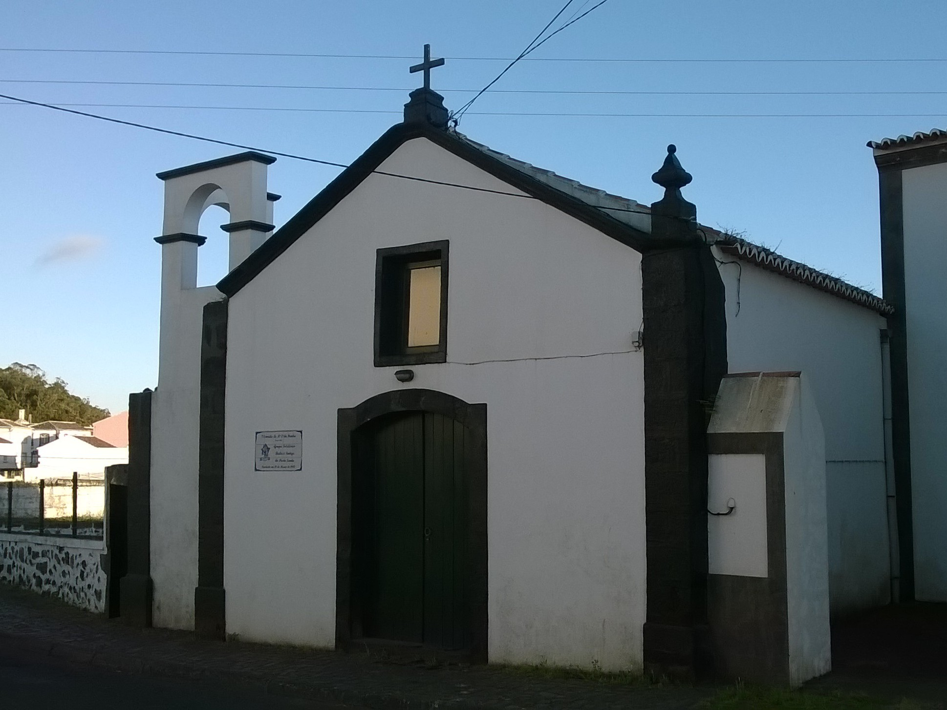 1.ª Ermida de Nossa Senhora da Penha (séc. XVII), freguesia do Posto Santo, concelho de Angra do Heroísmo, ilha Terceira, Região Autónoma dos Açores, Portugal